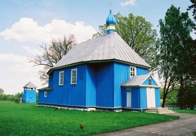 Церковь Св. Никиты в деревне Здитово Жабинковского района Белорусии. Дополнительную информацию см. на сайте ЮНЕСКО